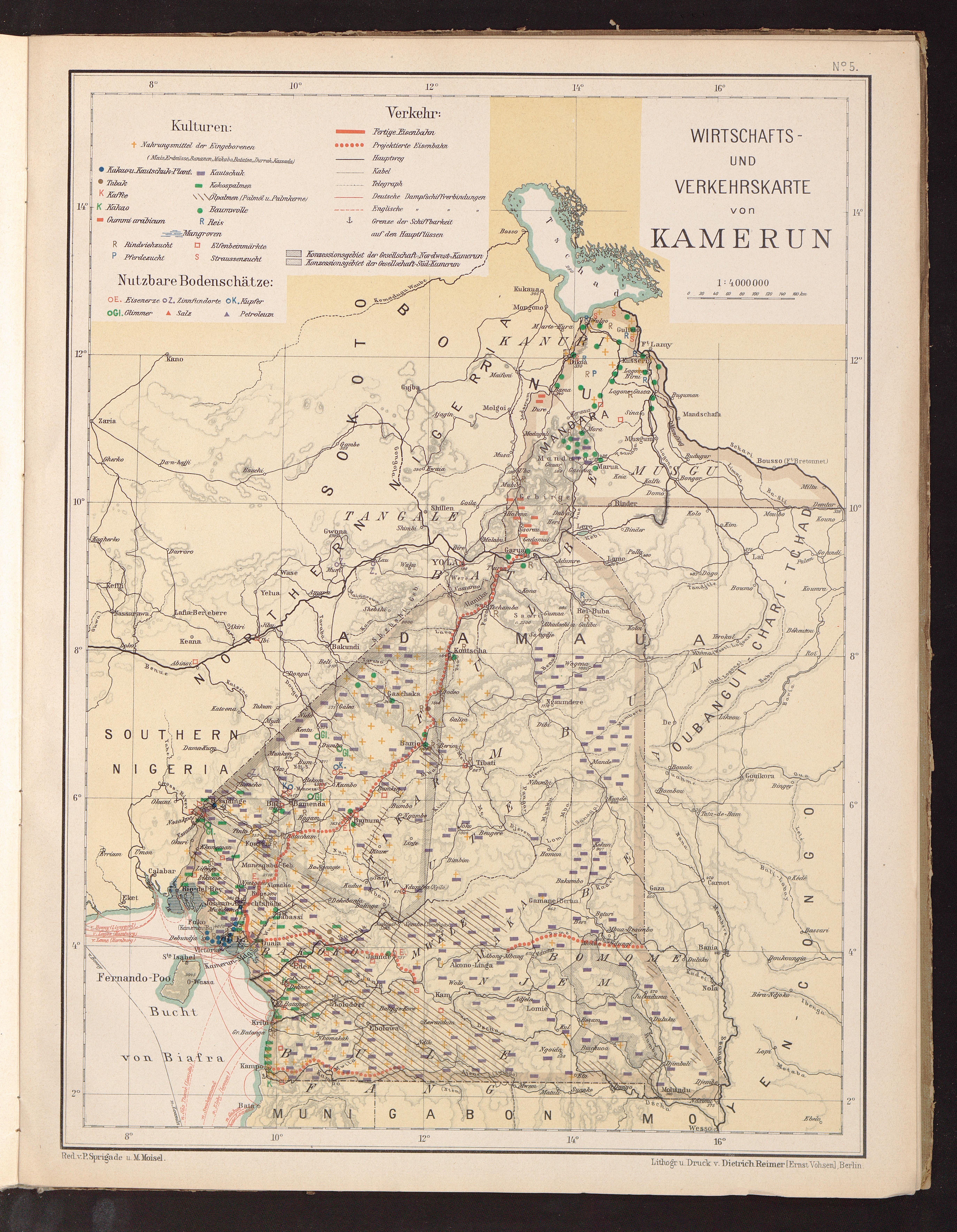 Wirtschaftsatlas der Deutschen Kolonien